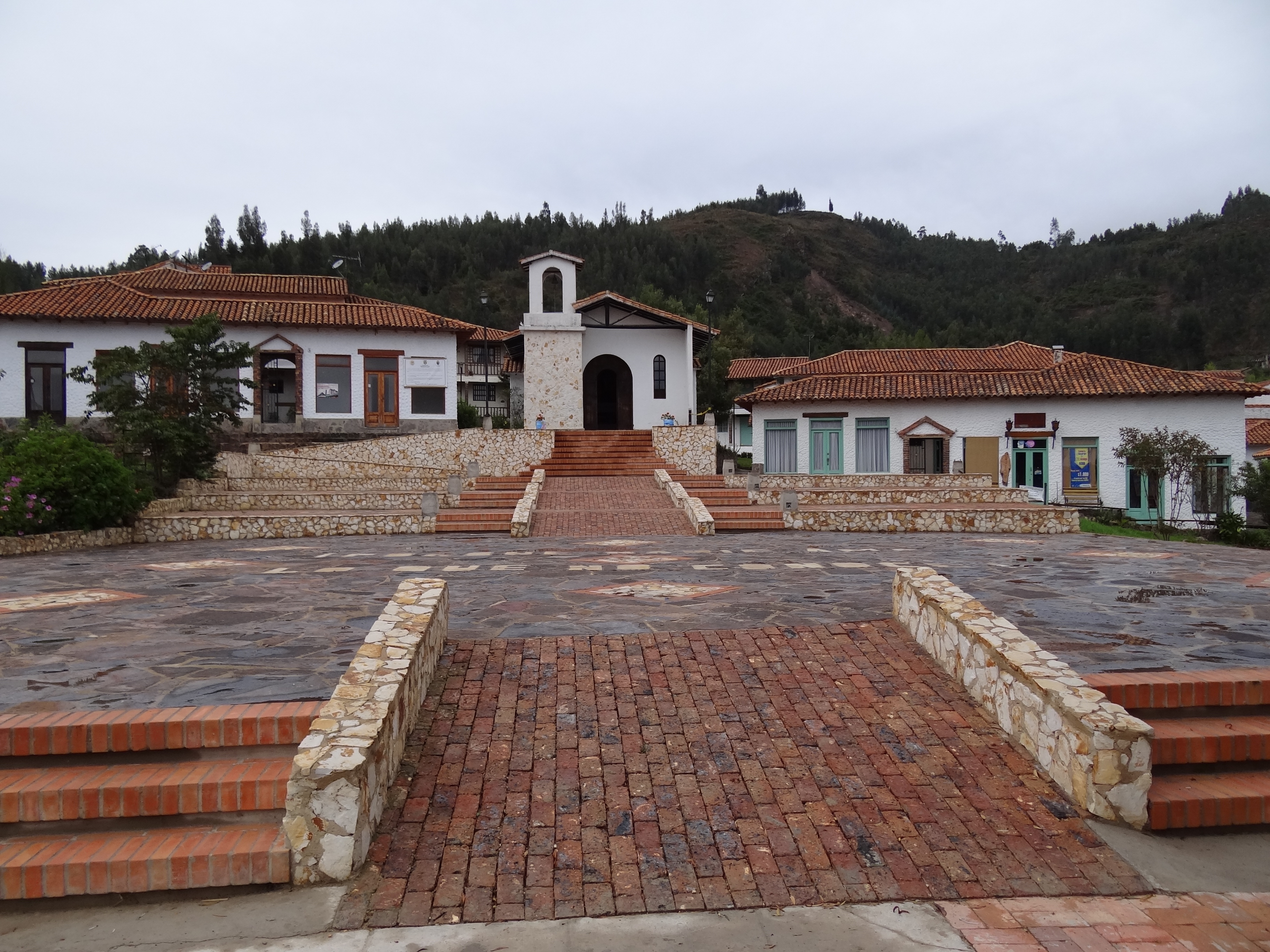 Escenarios del pueblito boyacence en la ciudad de Duitama, departamento de Boyacá, Colombia